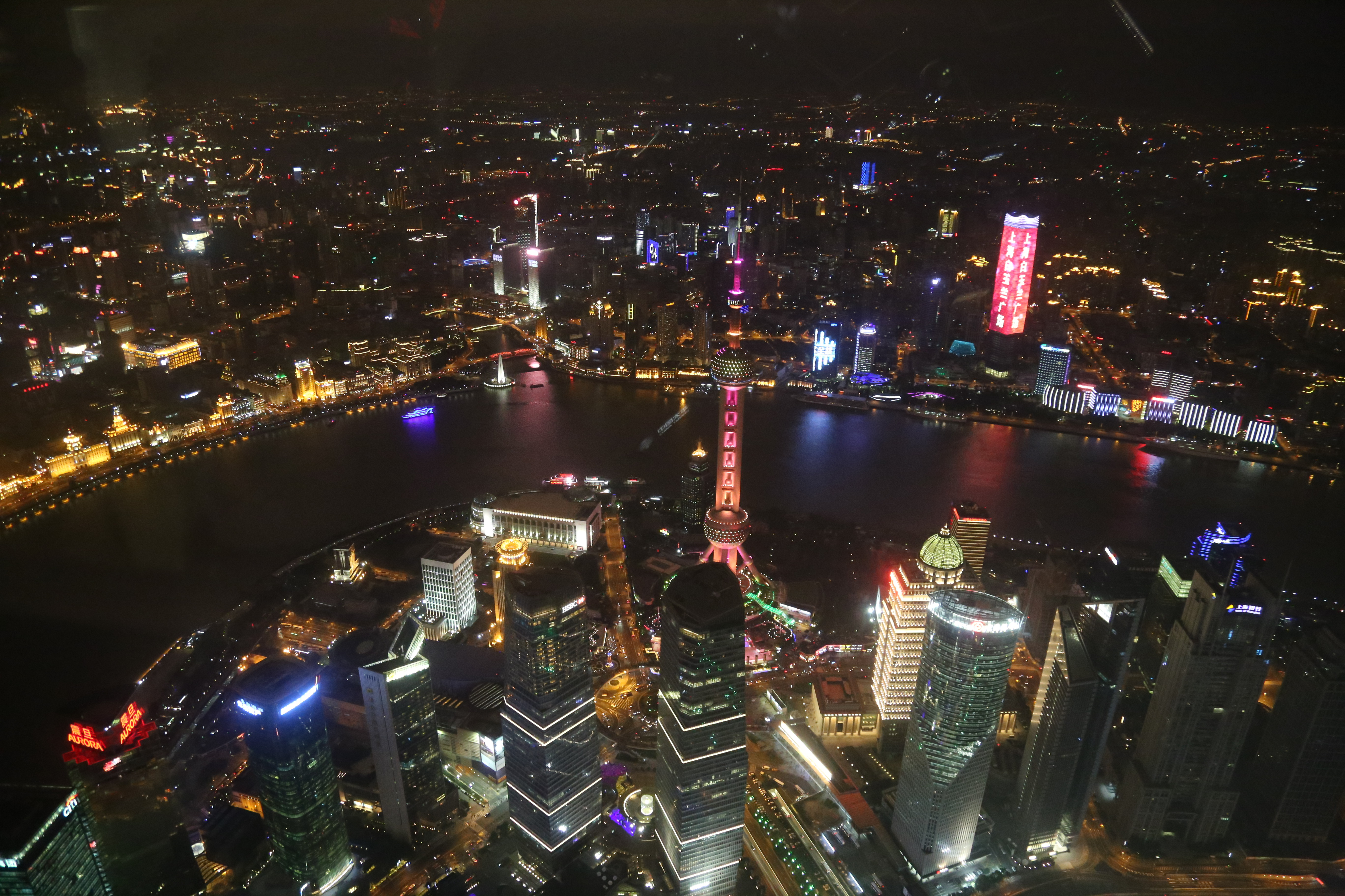 眺望陆家嘴和外滩夜景